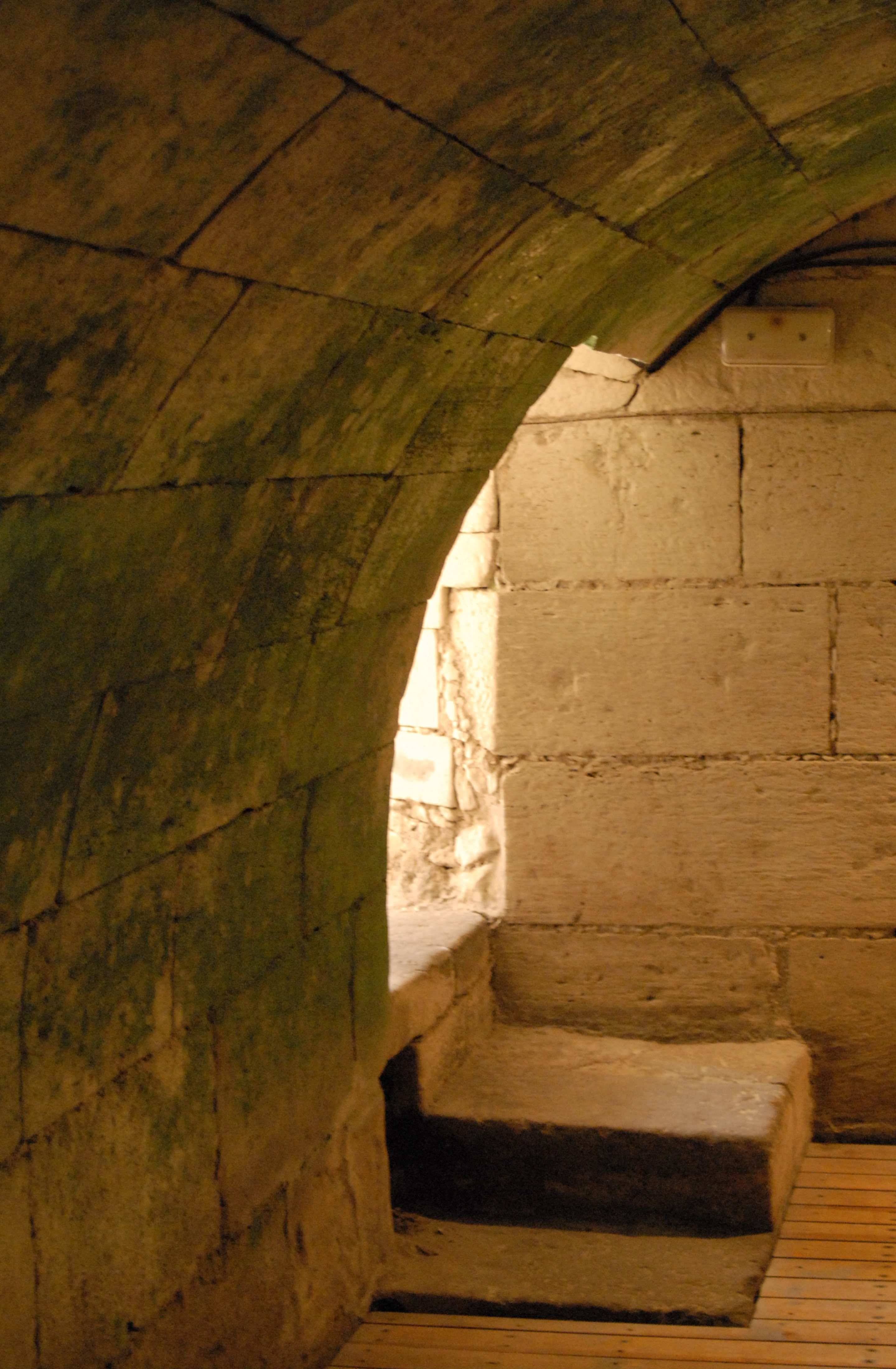 Salida del aljibe